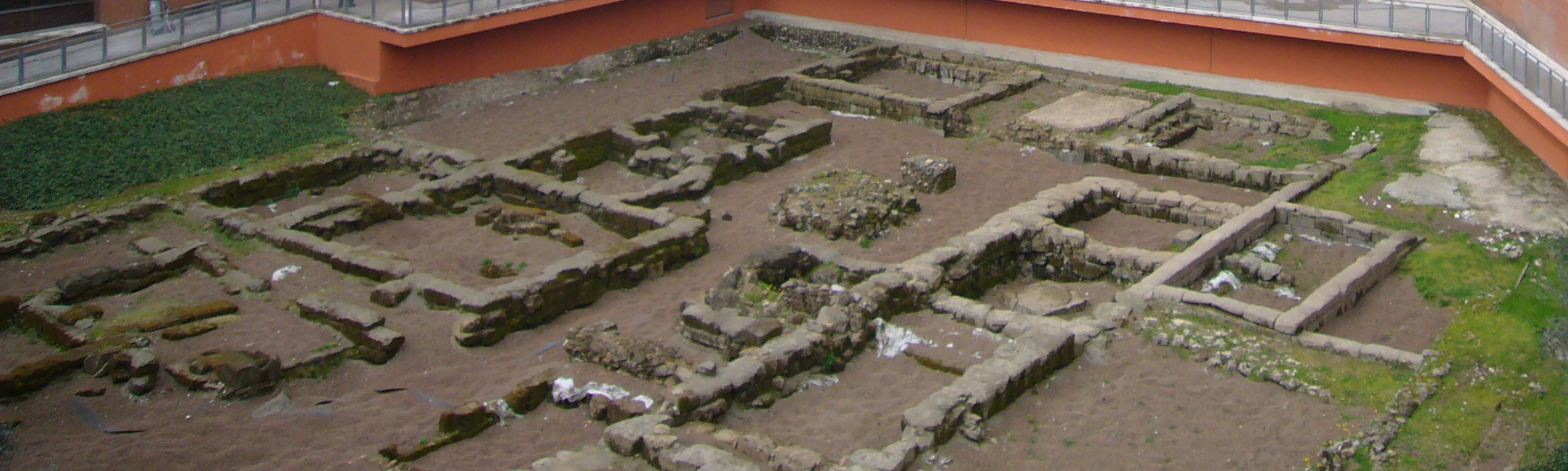 Roma scavi della villa romana all' Auditorium Parco della Musica